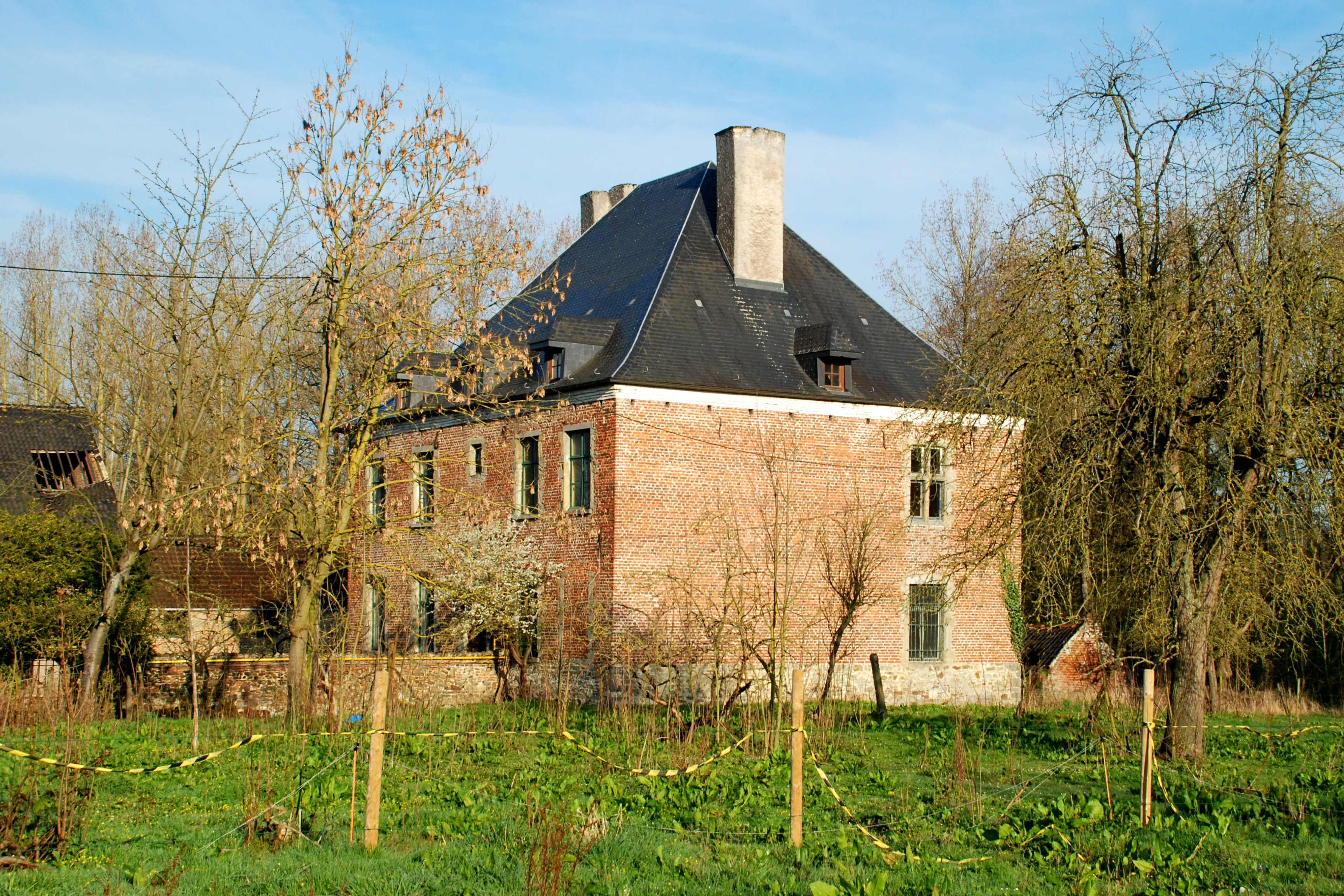 Belgique - Brabant wallon - Ottignies - Manoir de Franquenies